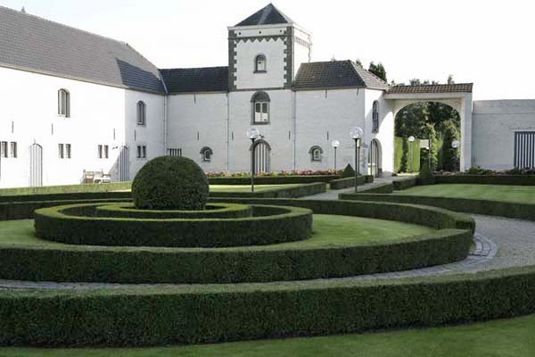 Château de laTournette